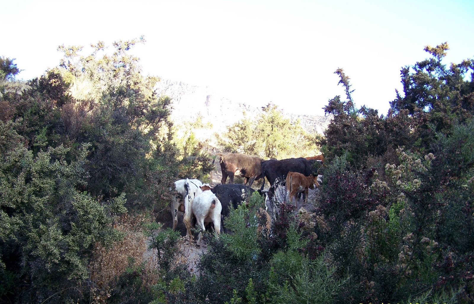 Crianza de Vacunos en Aurahua